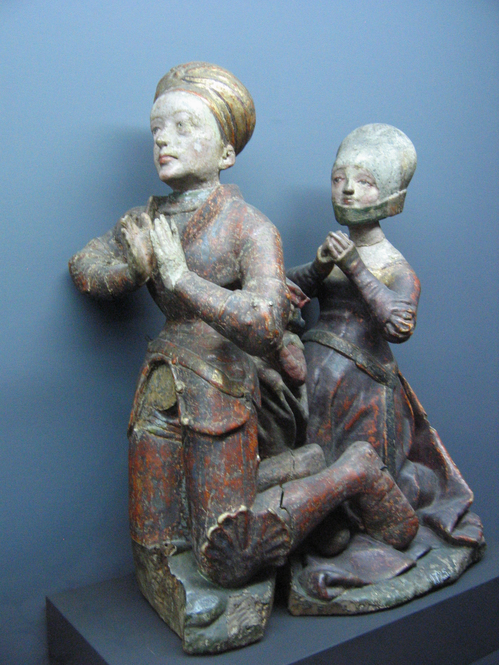 Pastori di legno in exposizione nel Bayerisches Nationalmuseum - Germania